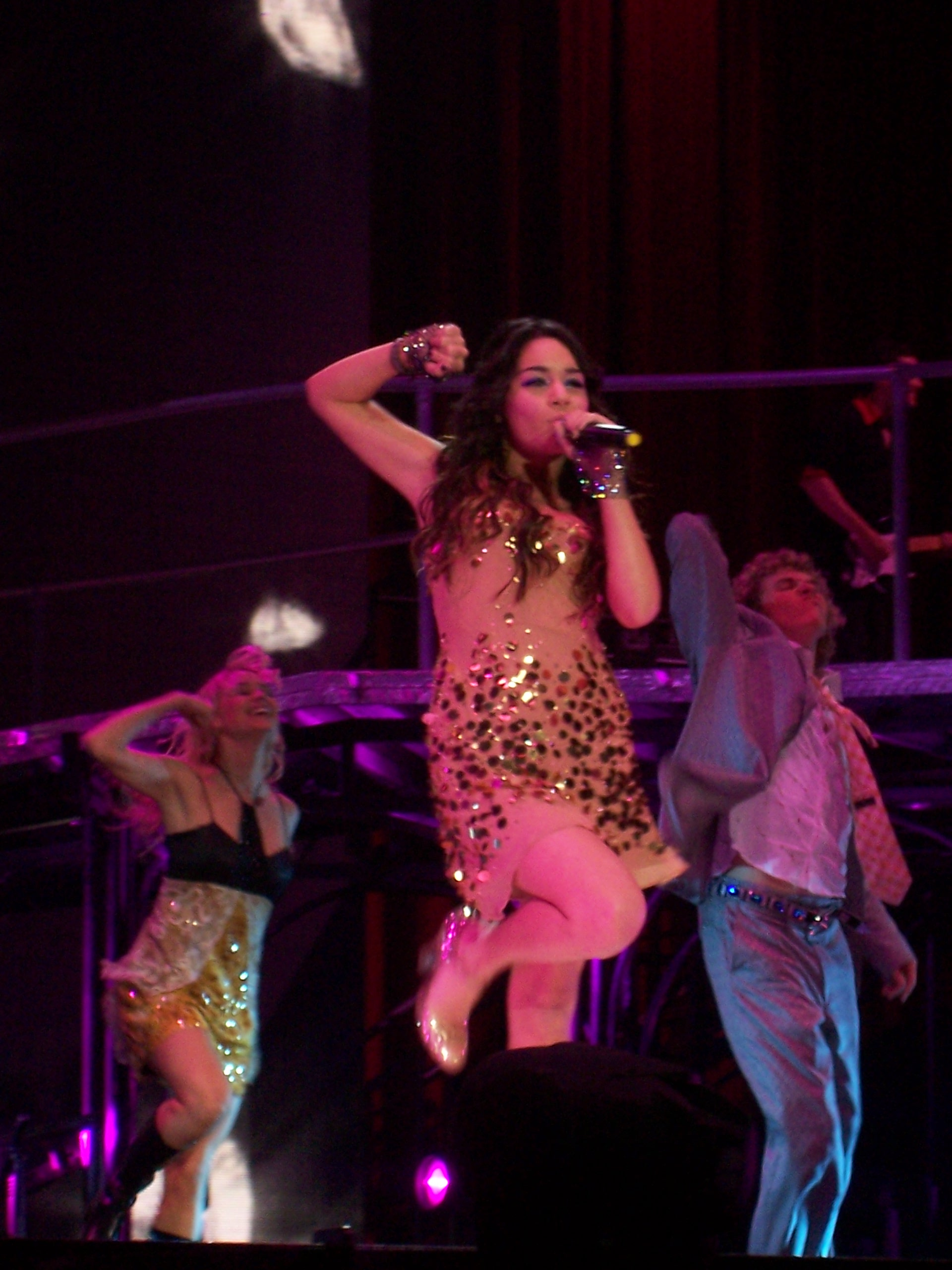 Let's Dance